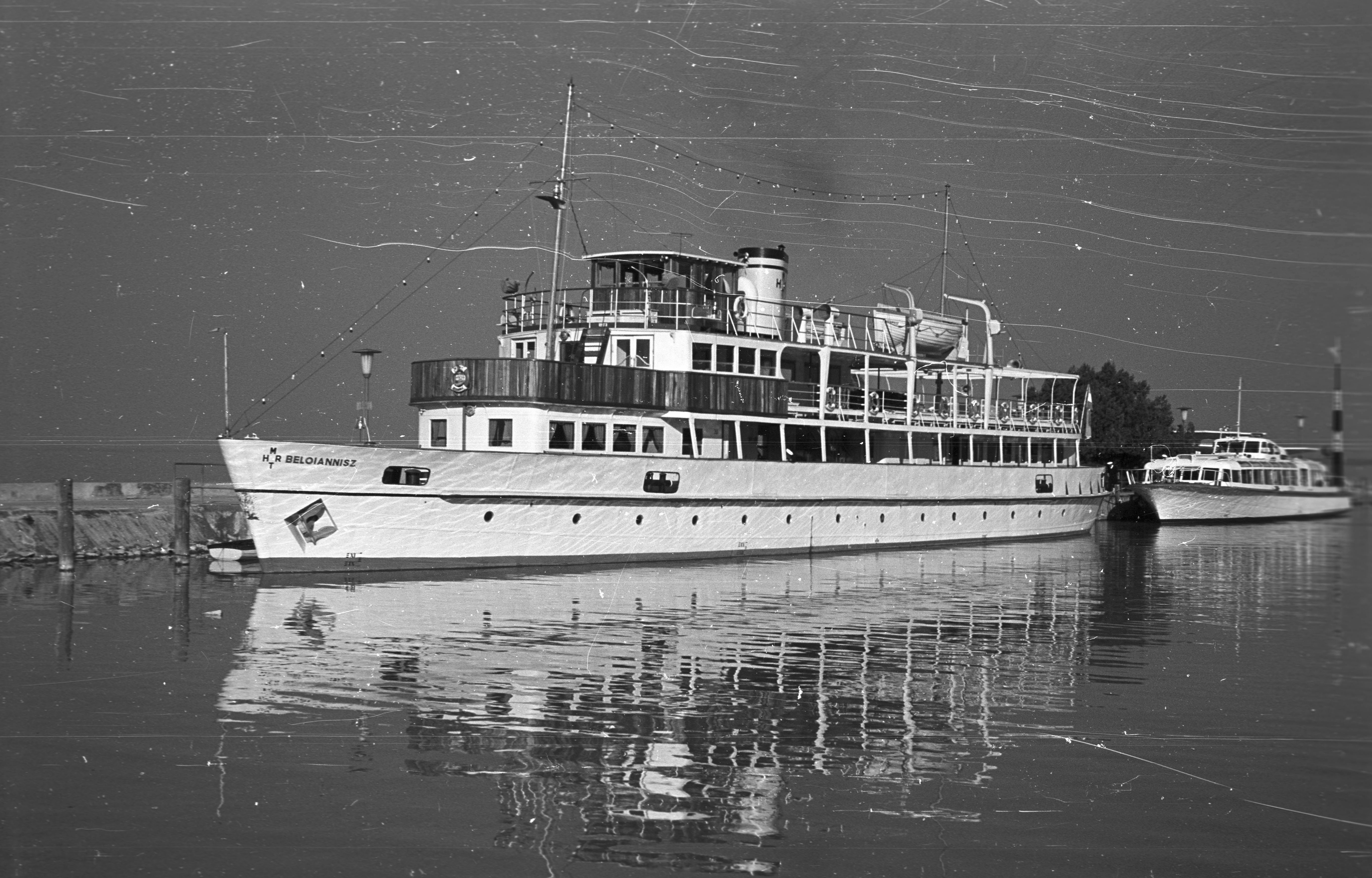 kikötő, előtérben a Beloiannisz személyhajó. Location: Hungary, Lake Balaton Tags: ship, water surface, port, water bus, Beloiannisz ship Title: kikötő, előtérben a Beloiannisz személyhajó.